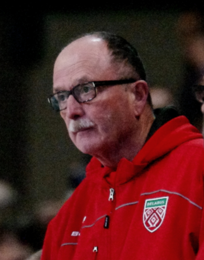 France vs. Biélorussie, 1er mai 2017